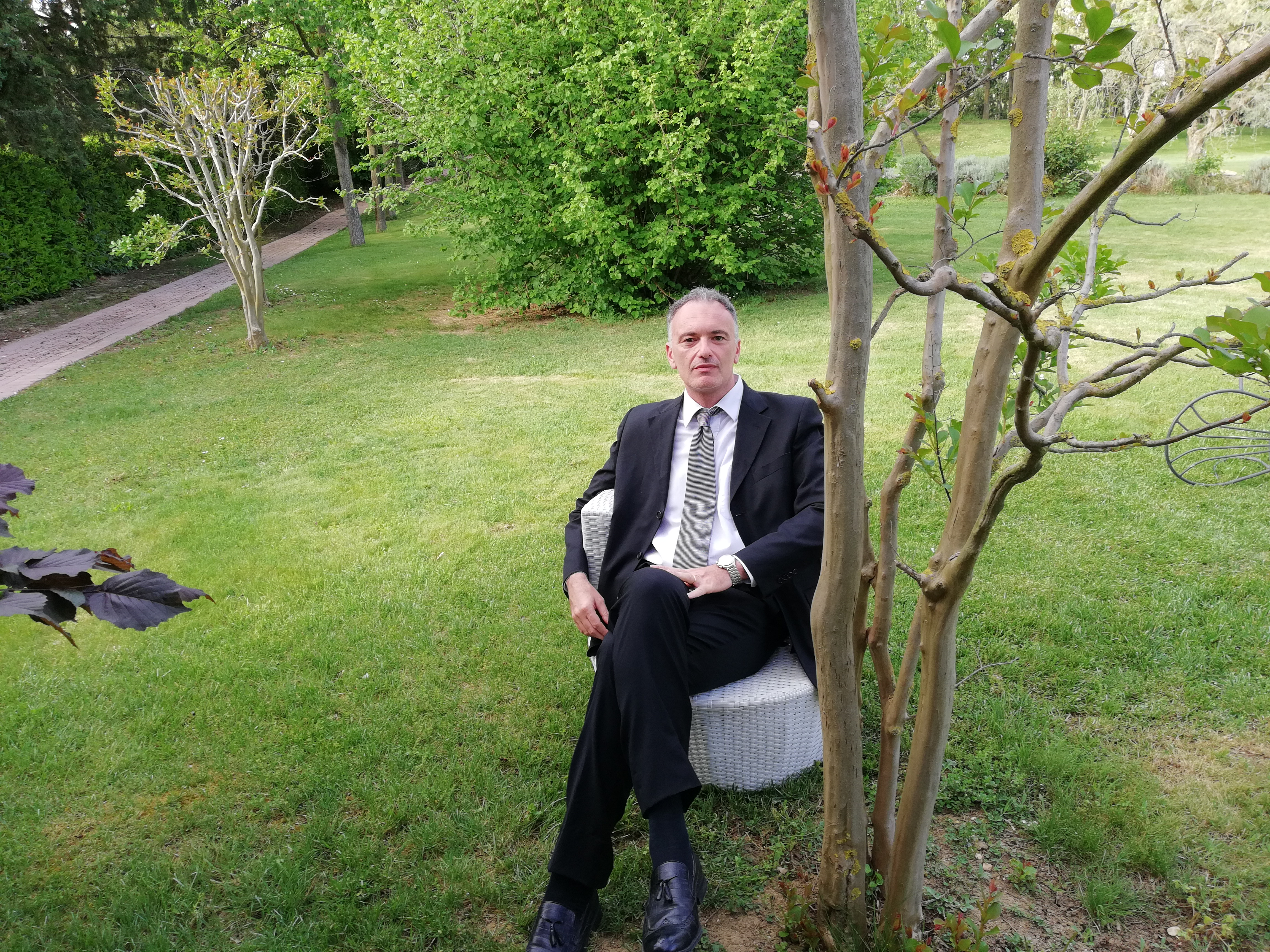 Lo scrittore Rigel Bellombra